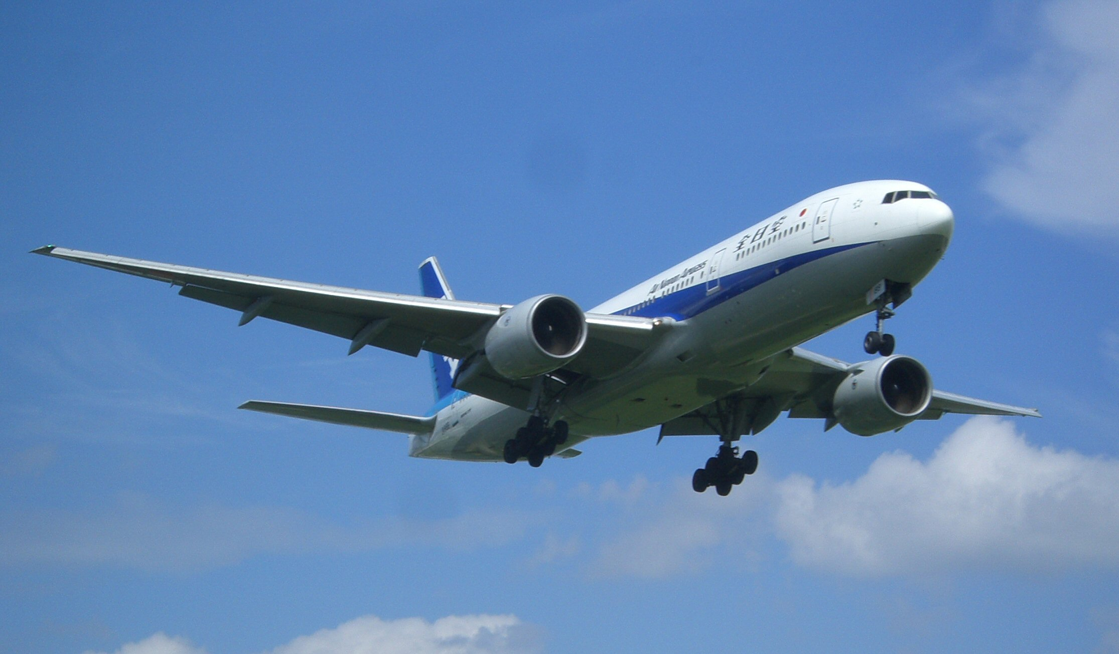 Boeing777 landing on Osaka (Itami) Airport, Japan;大阪国際空港（伊丹空港）に着陸する777